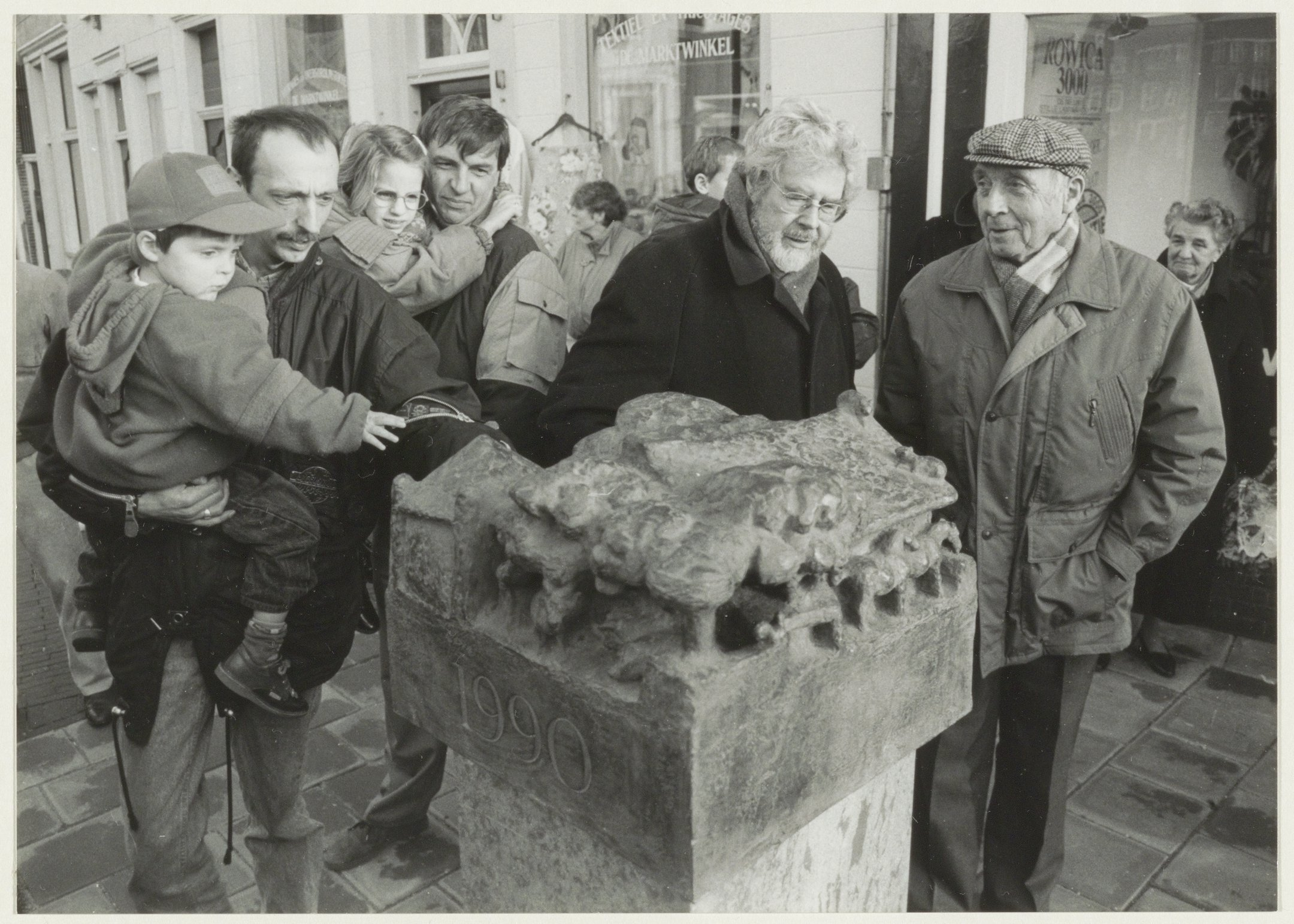 CollectieCollectie Fotoburo de BoerInventarisnummerNL-HlmNHA_54032244NL-HlmNHA_1478_35678kBeschrijvingOp 10 januari 1990 onthulde boer Piet van der Zwet (rechts) een kunstwerk aan de Spaarnwouderstraat. Dit beeldje van de Amsterdamse kunstenaar Arie Teeuwisse (naast van der Zwet) stelt een boerdij voor en is ter nagedachtenis aan van der Zwet en zijn voorouders die vanaf 1896 aan de Leliestraat hebben geboerd. In 1985 hield van der Zwet ermee op, maar zijn boerderij leeft in het beeldje verder.FotonummerNL-HlmNHA_1478_3322DocumenttypeHistorieprenten, tekeningen en foto'sSoort vervaardigerFotograaf AnnotatiesD126-1HD.110192PersonenZwet, P.J. (Piet) van derTeeuwisse, Adrianus Johannes Petrus Franciscus (Arie) (1919-1993) LandNederland ProvincieNoord-Holland GemeenteHaarlem PlaatsHaarlem StraatSpaarnwouderstraat GeografischSpaarnwouderbuurt Begindatum10-01-1992Einddatum10-01-1992Datering gebeurtenis10-01-1992TechniekFoto TrefwoordenStandbeelden, monumenten en gedenktekens, Boerderijen, Beeldende kunsten